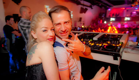 Vanessa e o DJ Diego Miranda no lançamento do videoclip do dueto "Speed"